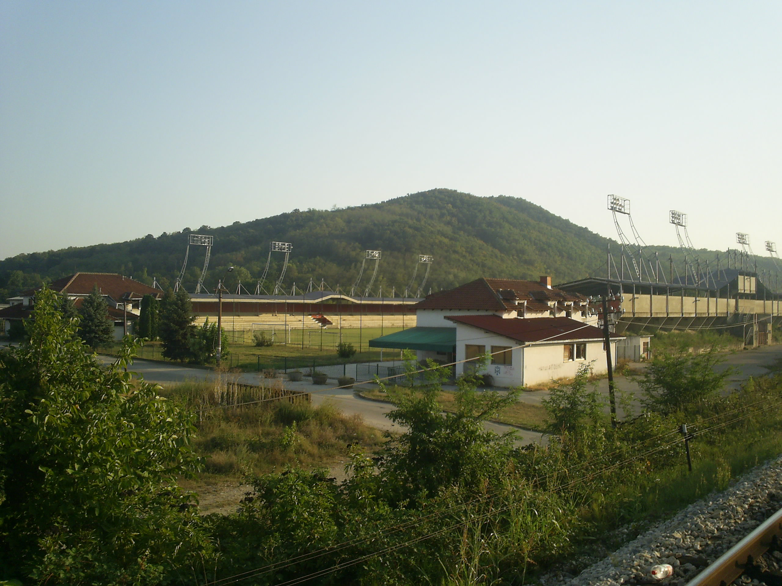 Стадион у Бадњевцу